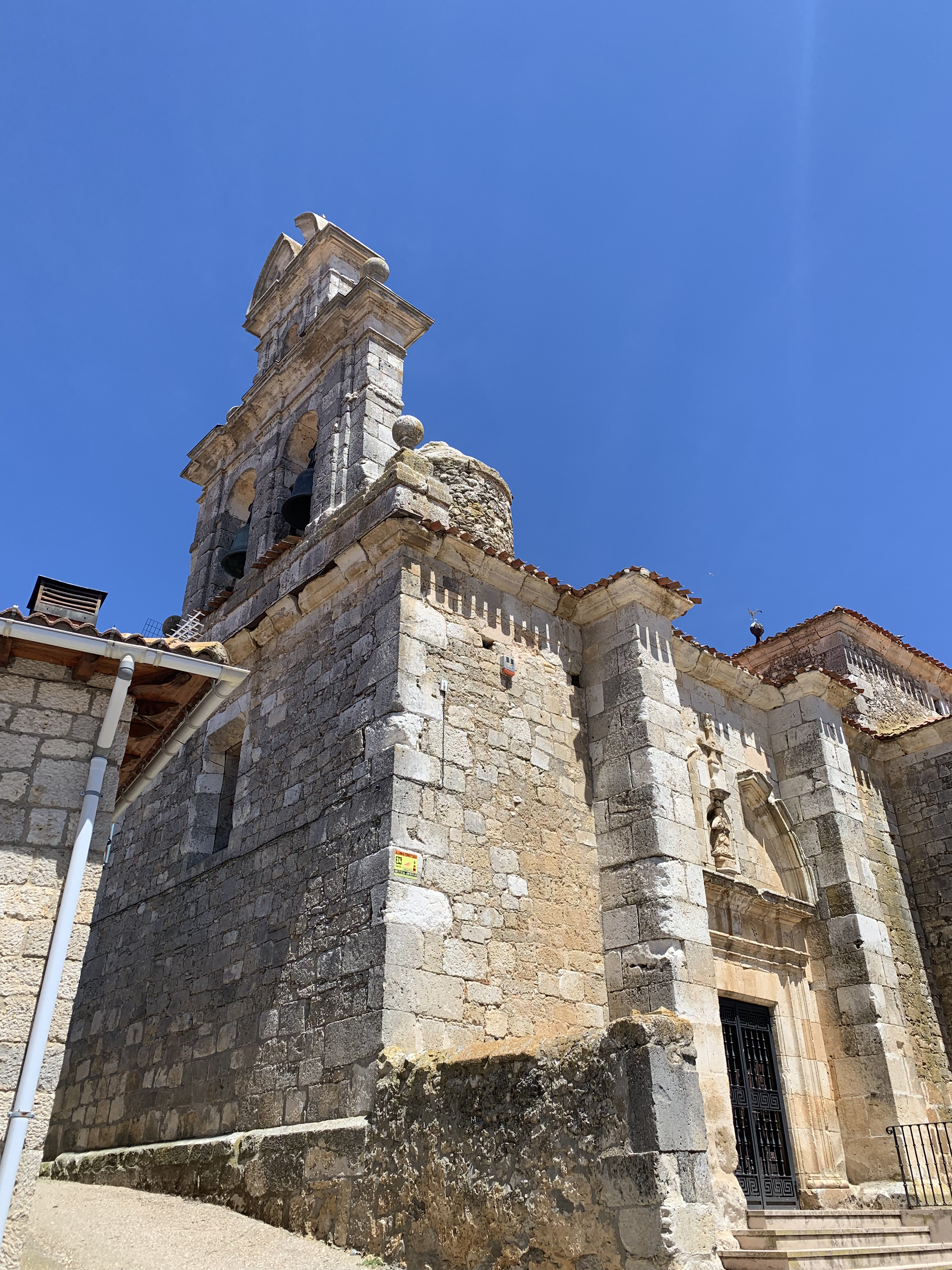 Iglesia de San Lorenzo en Santa María del Mercadillo